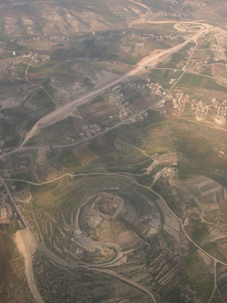 מבצר הhe:הרודיון ושרידי הרודיון תחתית. צולם והועלה על ידי אסף.צ בhe:15 במרץ he:2005. מצולם לכיוון צפון-צפון-מערב.